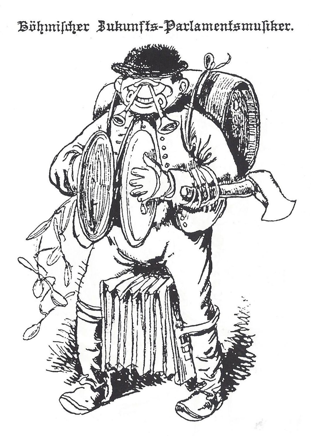 Karikatur eines böhmischen Musikanten. „Häufigste Erkennungsmerkmale des Tschechen in der deutschen/österreichischen Karikatur sind Musikinstrumente. Die Tschechen werden als musizierende Nation dargestellt, wobei die Musikfreudigkeit für unbekümmerte Lebensweise, Leichtlebigkeit und fehlenden Ernst steht.“ Im österreichischen Reichstag waren die böhmischen/tschechischen Abgeordneten für ihre obstruktive Politik bekannt.